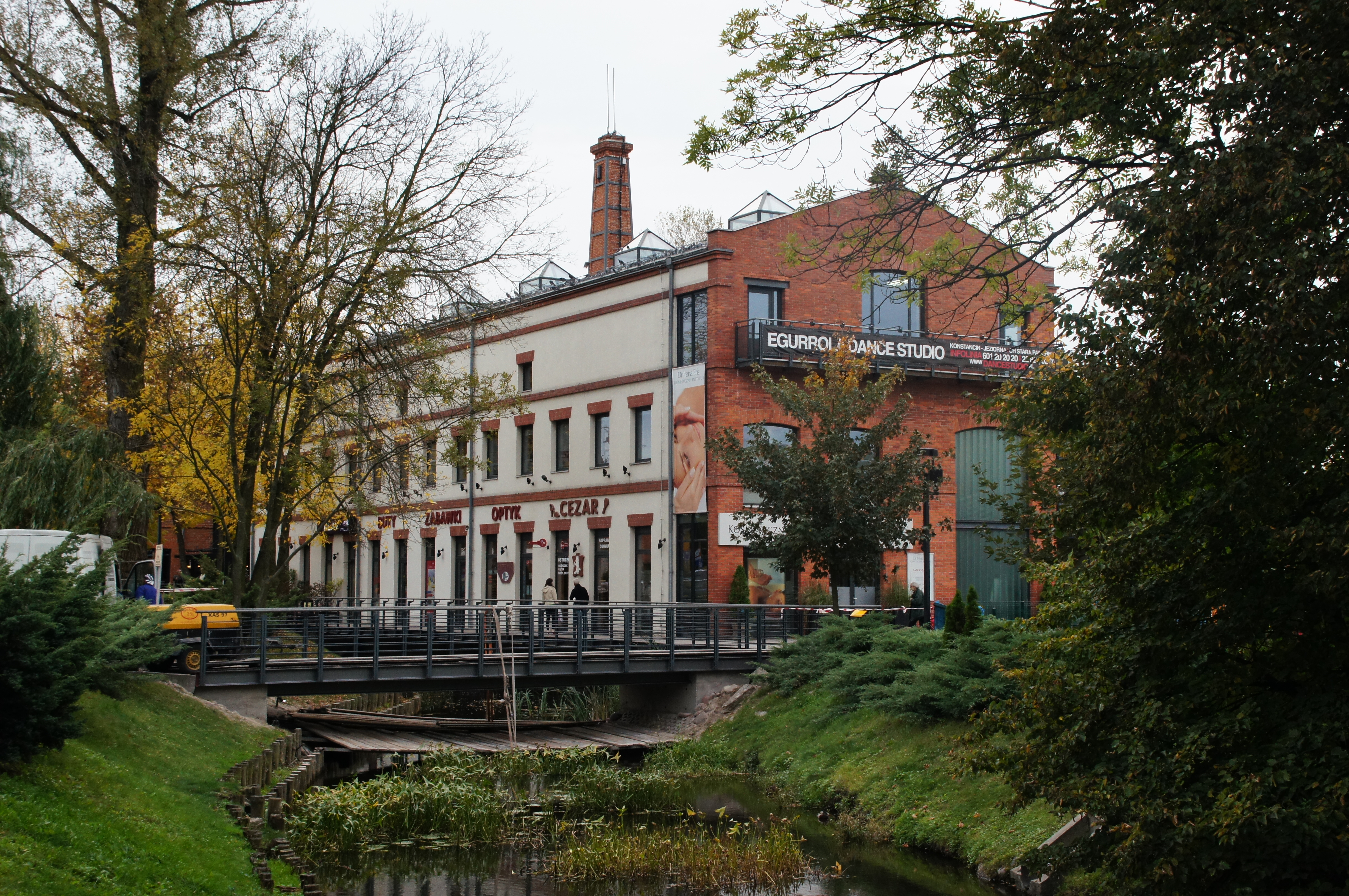 Konstancin-Jeziorna, zespół papierni, XIX